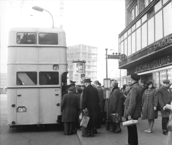 Zentralbild-Hesse-Gal-Qu-2. 4. 1963 Berlin-Stadtbezirk Mitte. Starker Andrang herrscht ständig an der Autobus-Haltestelle am Berliner Alexanderplatz (unser Bild).